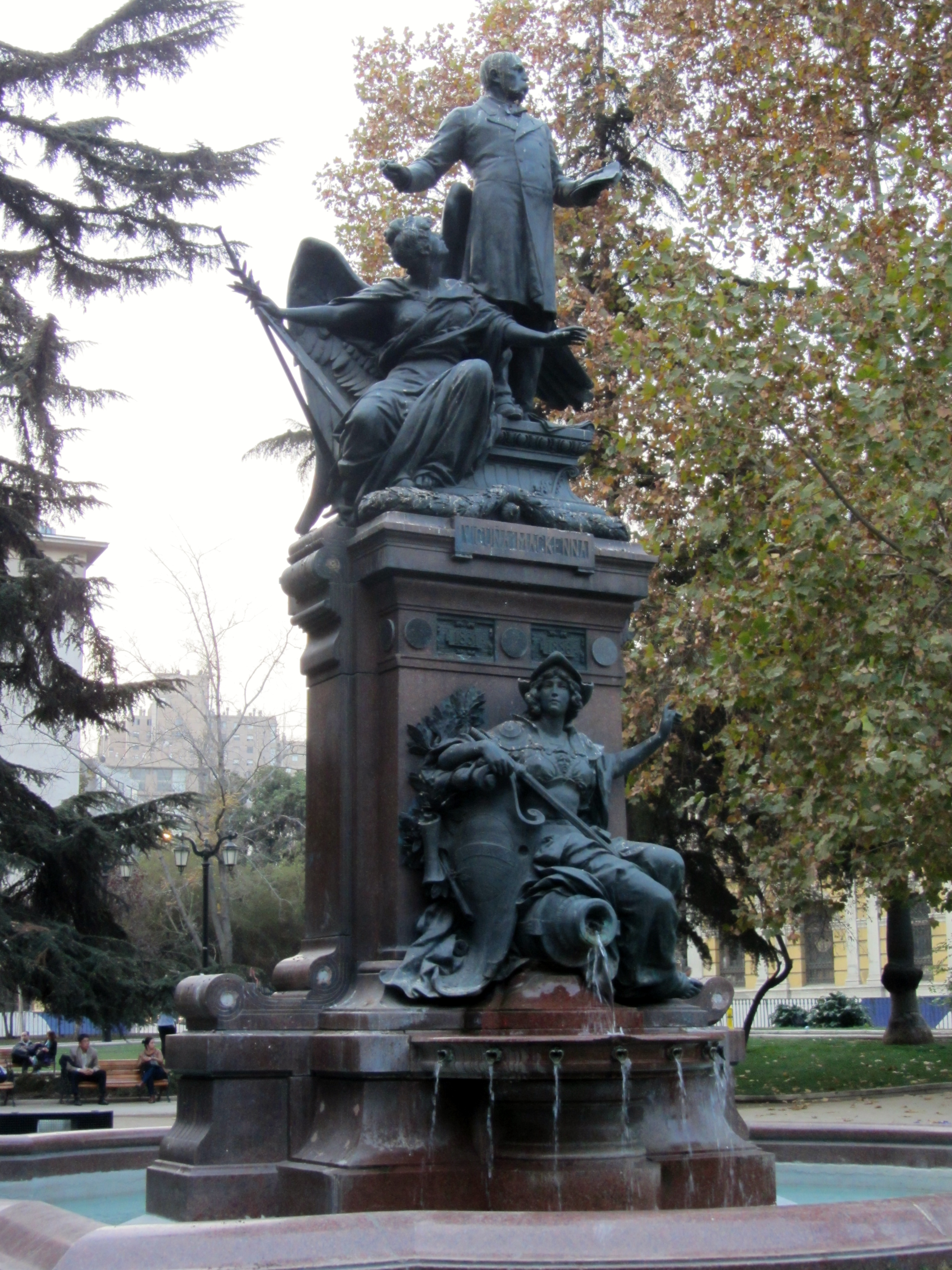 Monumento a Benjamín Vicuña Mackenna en la plaza homónima, Santiago de Chile, obra del escultor francés Jules-Félix Coutan.